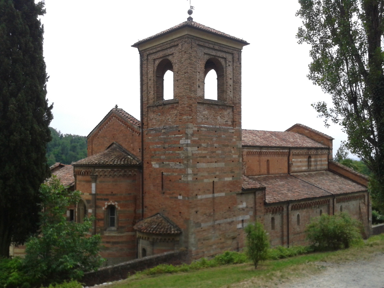 Abbazia di Santa Maria di Vezzolano (campanile) This is a photo of a monument which is part of cultural heritage of Italy.